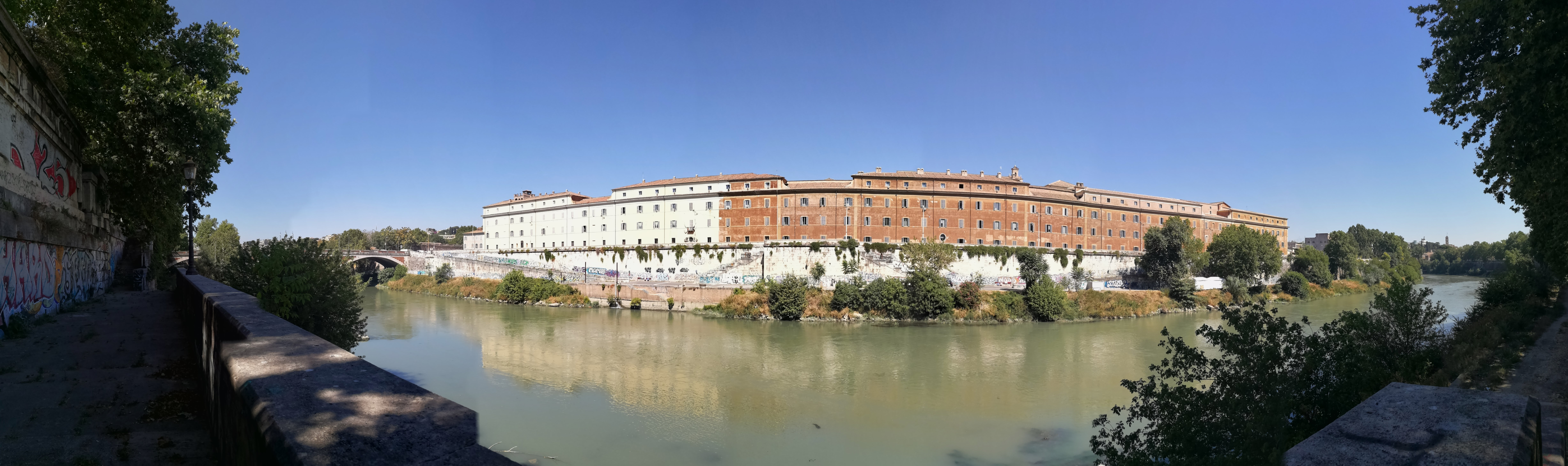 complesso monumentale di San Michele a Ripa Grande This is a photo of a monument which is part of cultural heritage of Italy.